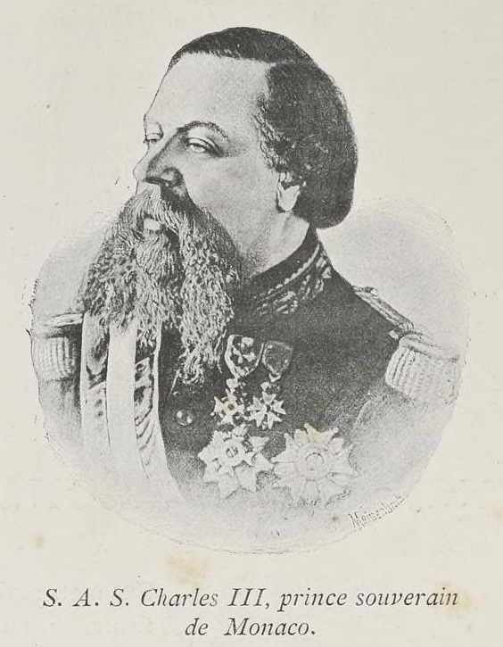 Ex Catalogus